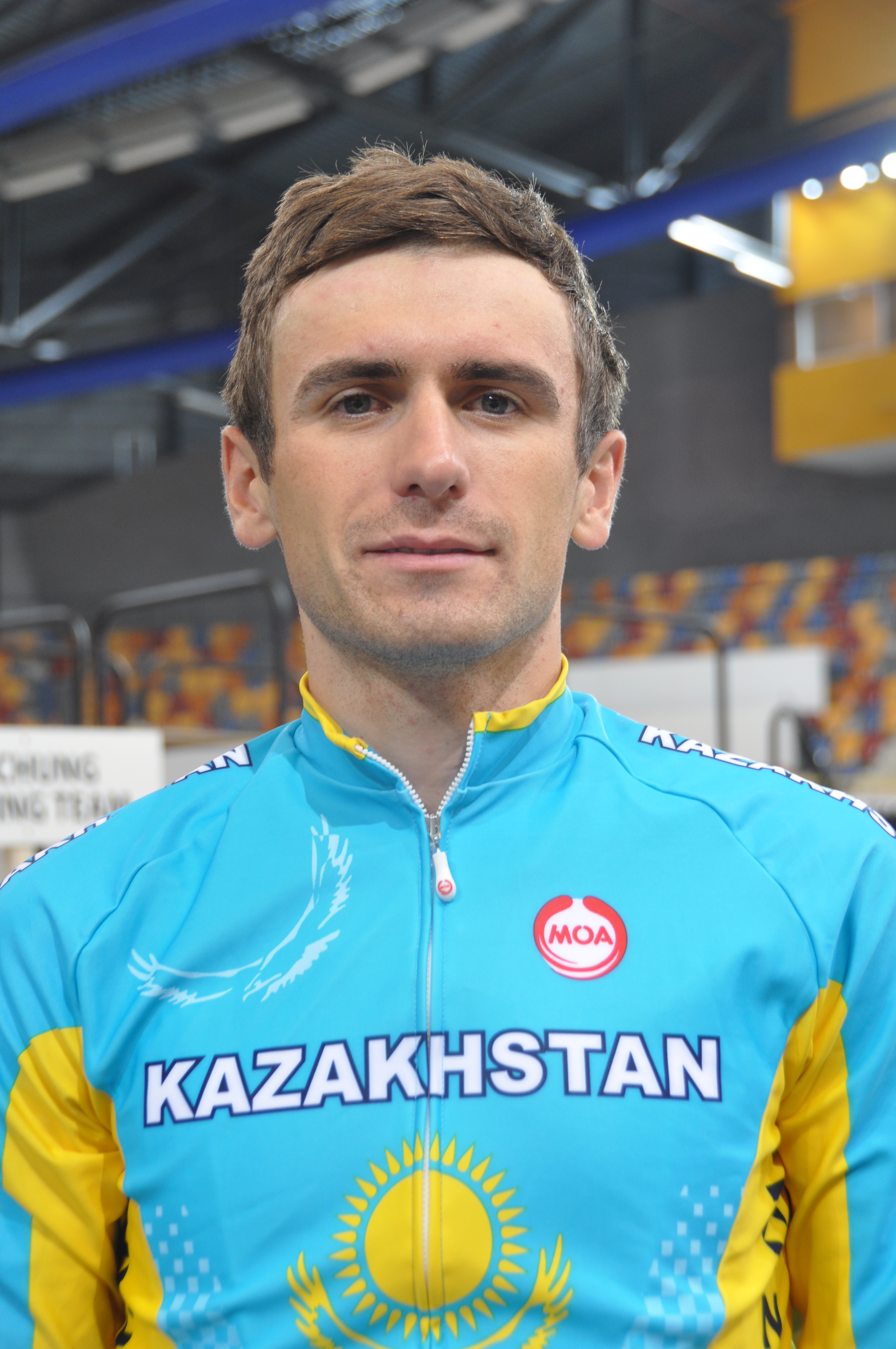 Artyom Zakharov, kasachischer Radsportler